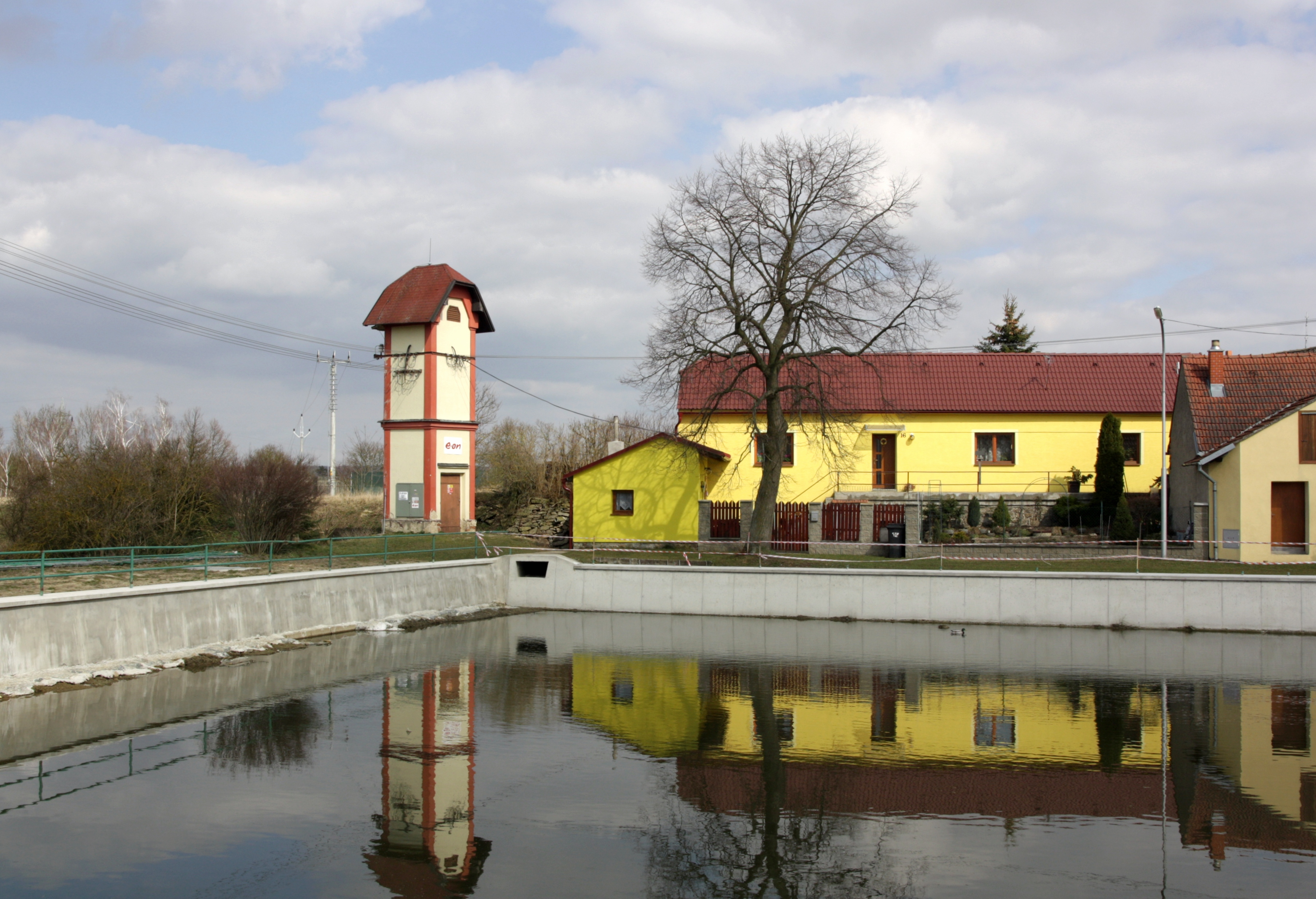 Zňátky - náves, rybník